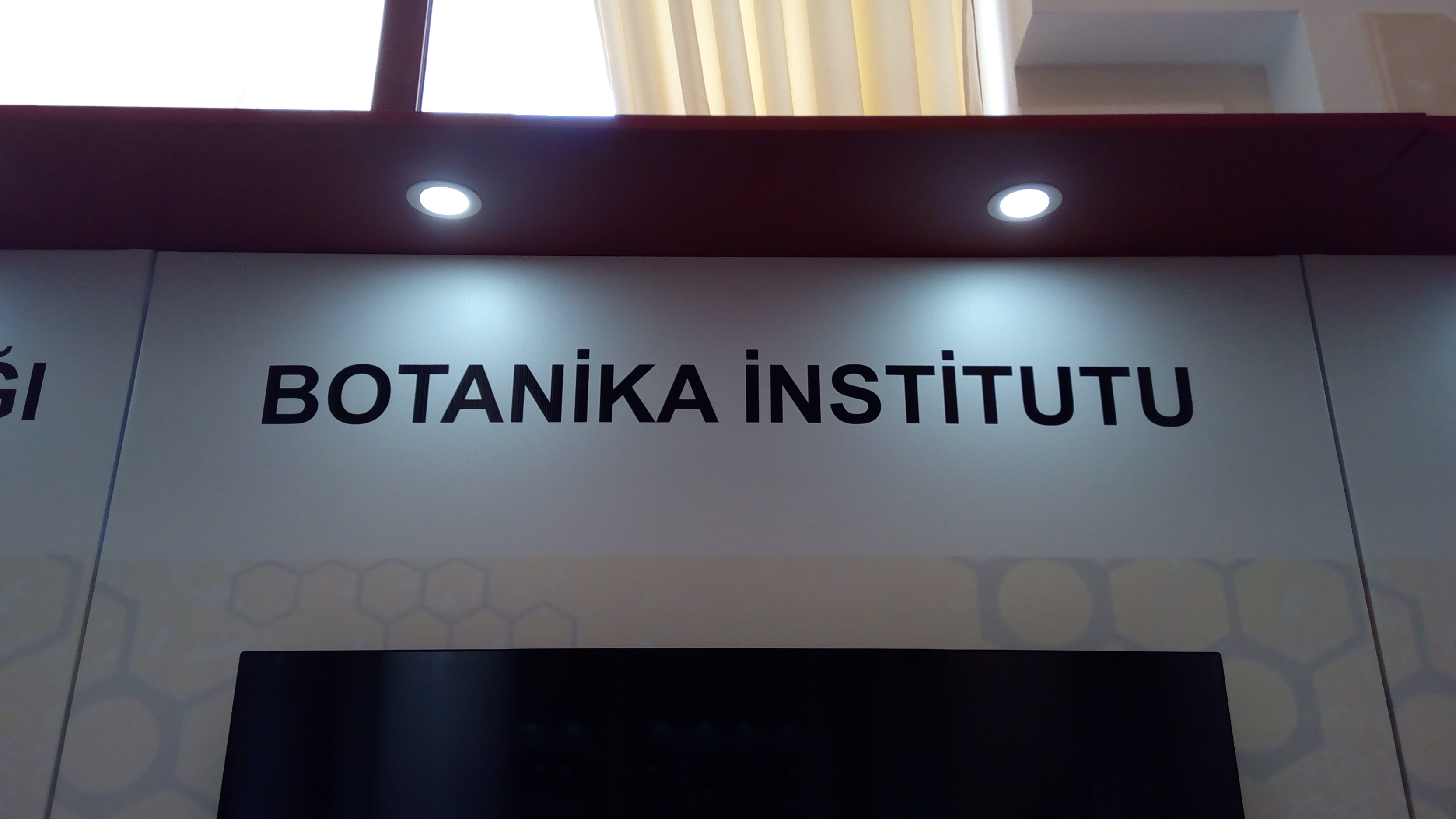 AMEA-nın sərgisi